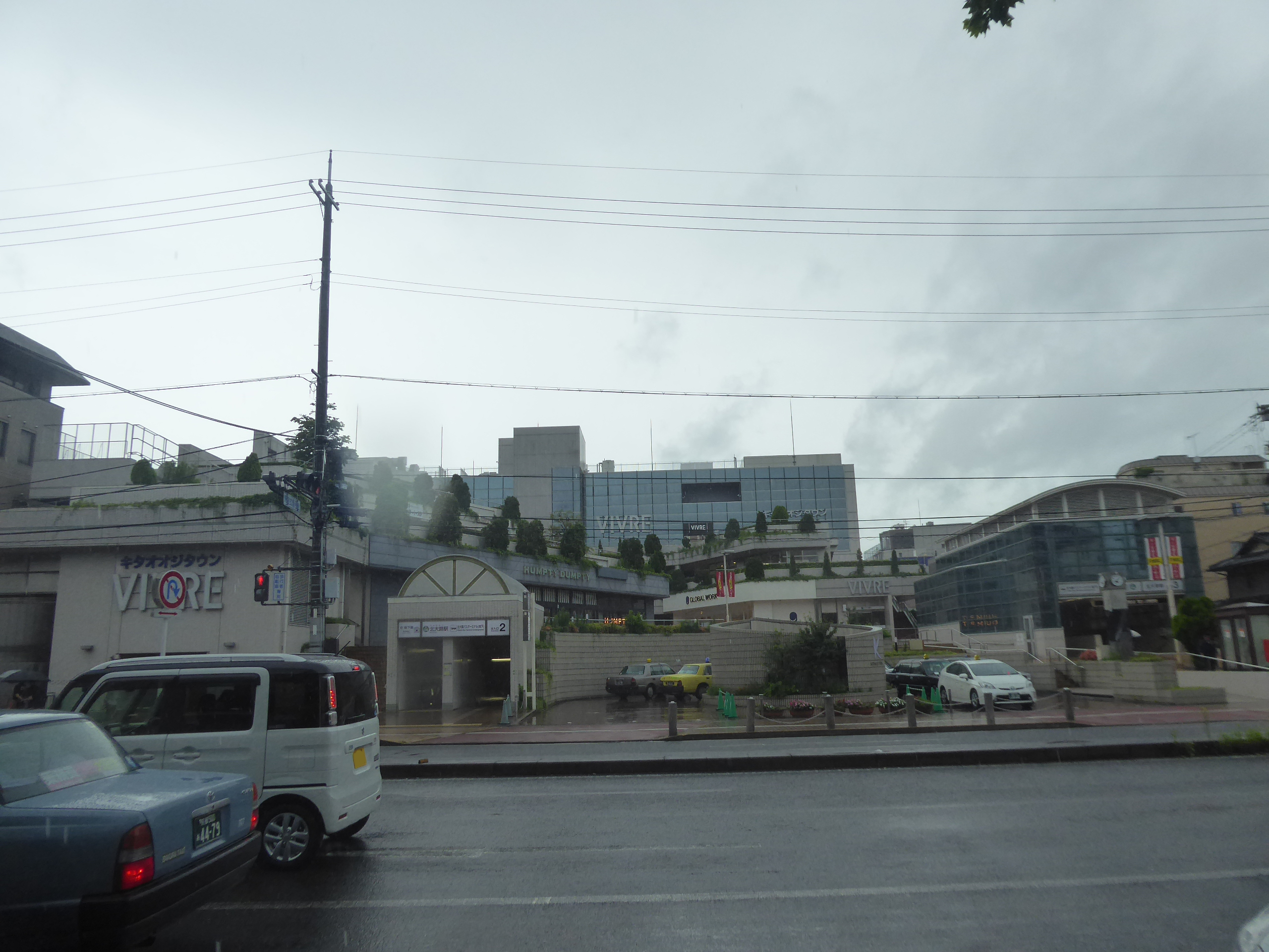 キタオオジタウンを撮影。